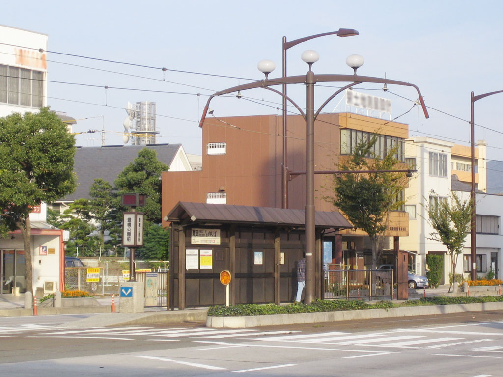 Toyohashi Kouen-mae Station (豊橋公園前駅), Toyohashi, Aichi, Japan